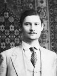 Pavlo Khrystiuk